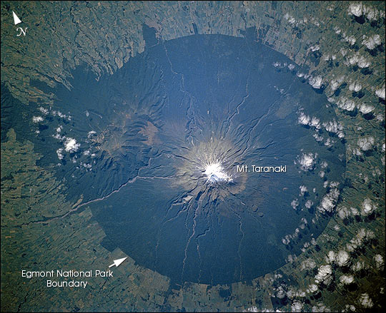 Radial drainage pattern